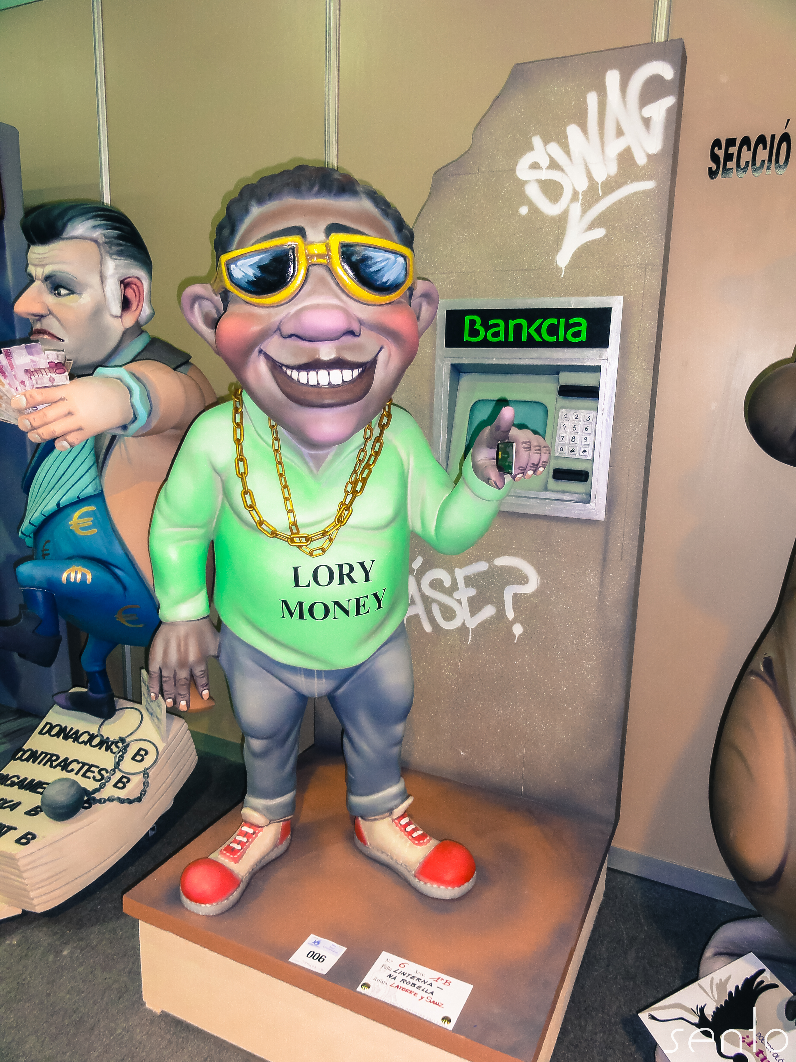 Exposició del NINOCH 2015